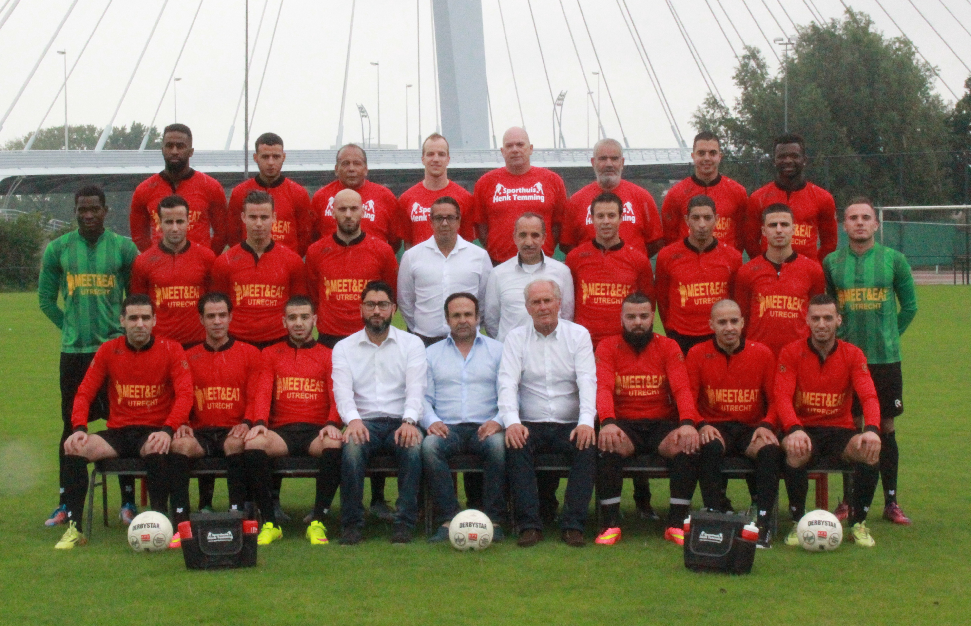 Magreb'90 topklasser seizoen 2015-2016